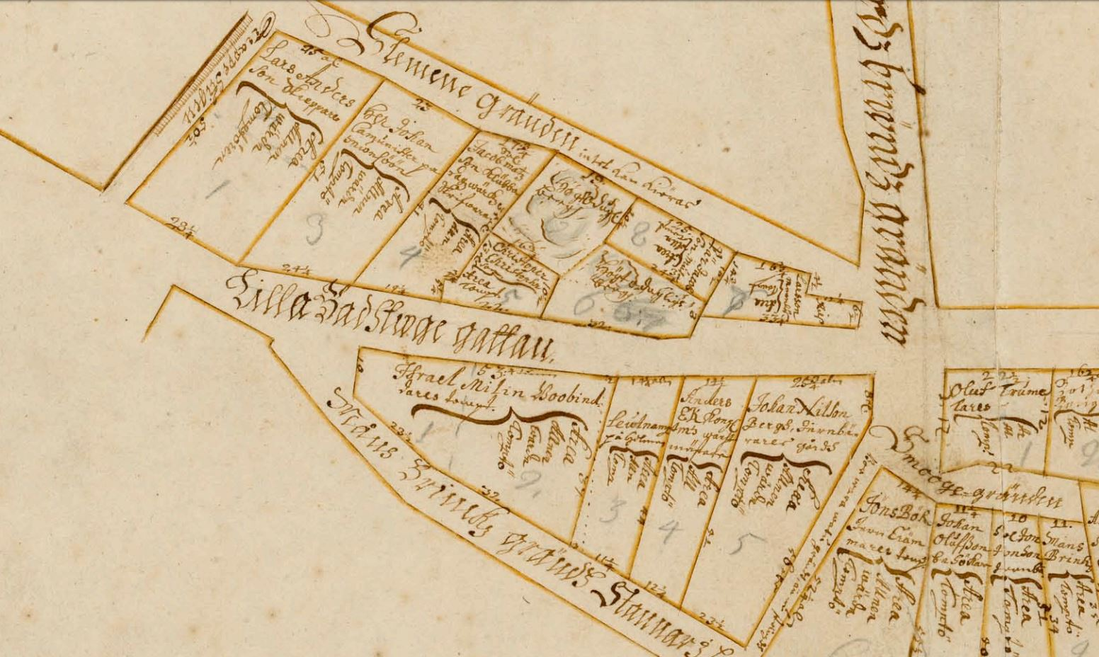 kv Trappan och kv Tofflan i Holms tomtbok (norr är neråt)